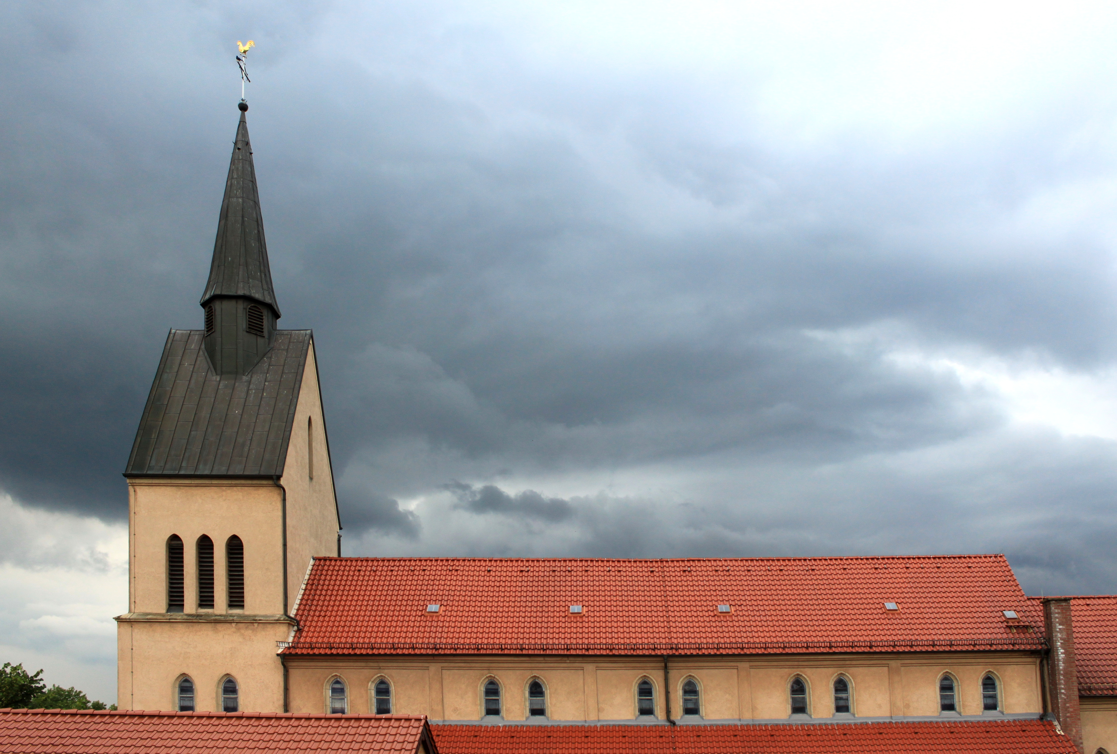 Die Kirche auf der Friedrich Naumann Straße